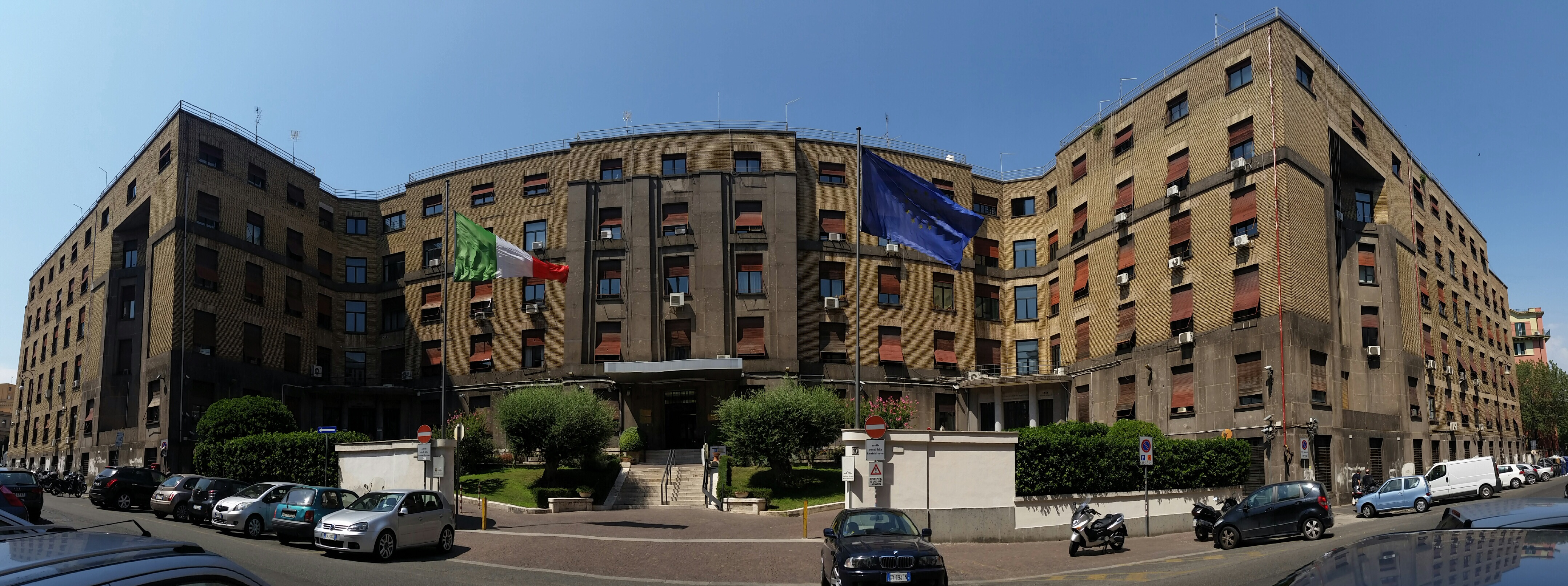 Sede centrale ANAS a Roma, via Monzambano 10